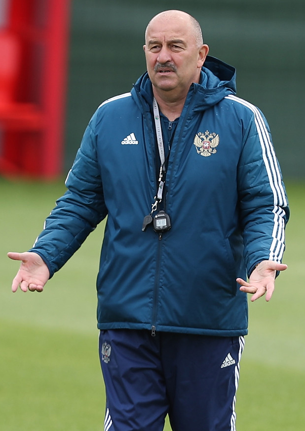 Сборная России продолжает готовиться к чемпионату мира